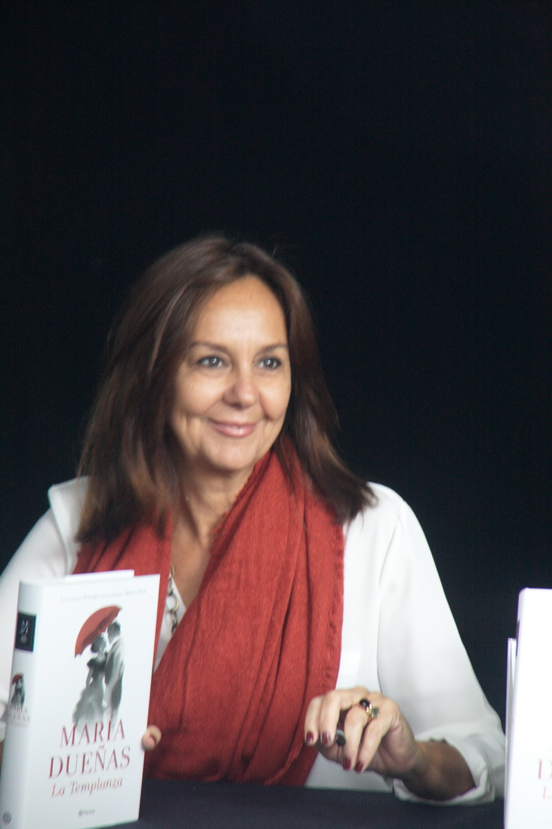 Signatura de llibres en la Diada de Sant Jordi-2015 a Barcelona